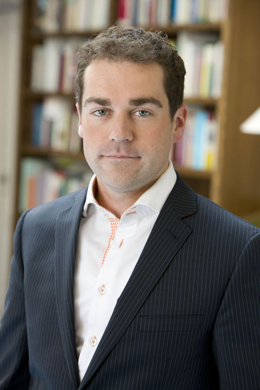 Klaas Henricus Dominicus Maria Dijkhoff (Soltau (Duitsland), 13 januari 1981) is sinds 17 juni 2010 lid van de Tweede Kamerfractie van de VVD.